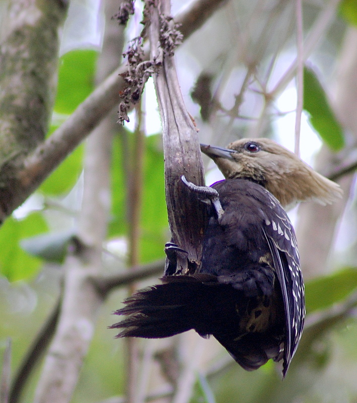 Blond-crested Woodpecker (Celeus flavescens) Parque Burle Marx em São Paulo